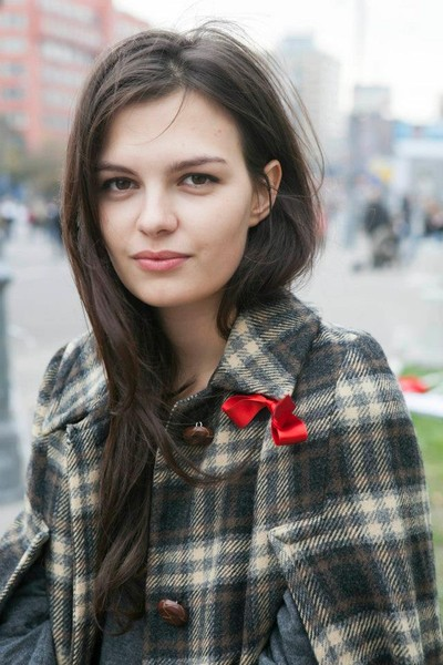 Изабель Магкоева, лето 2012 г.